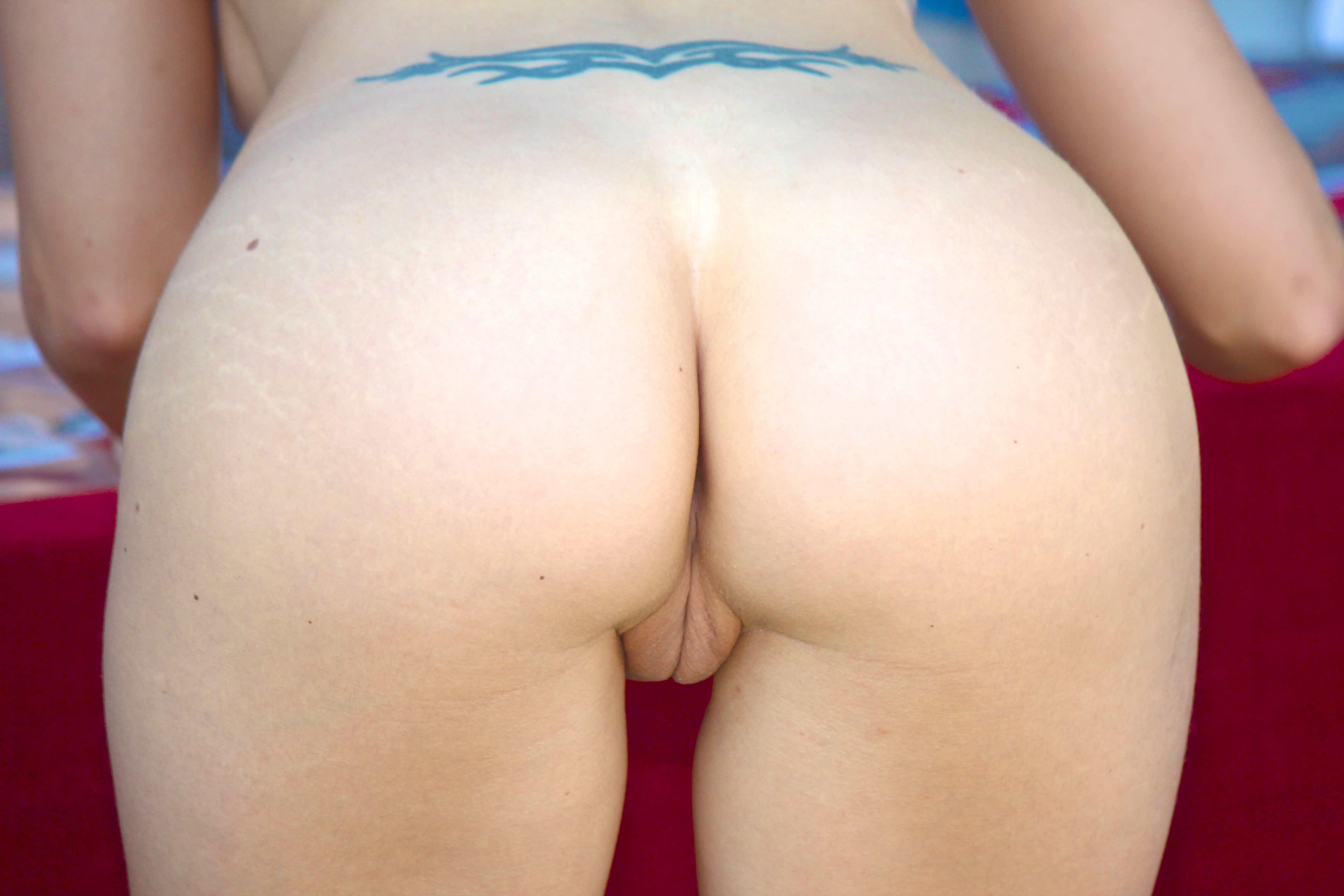 Ponderosa Sun, Indiana